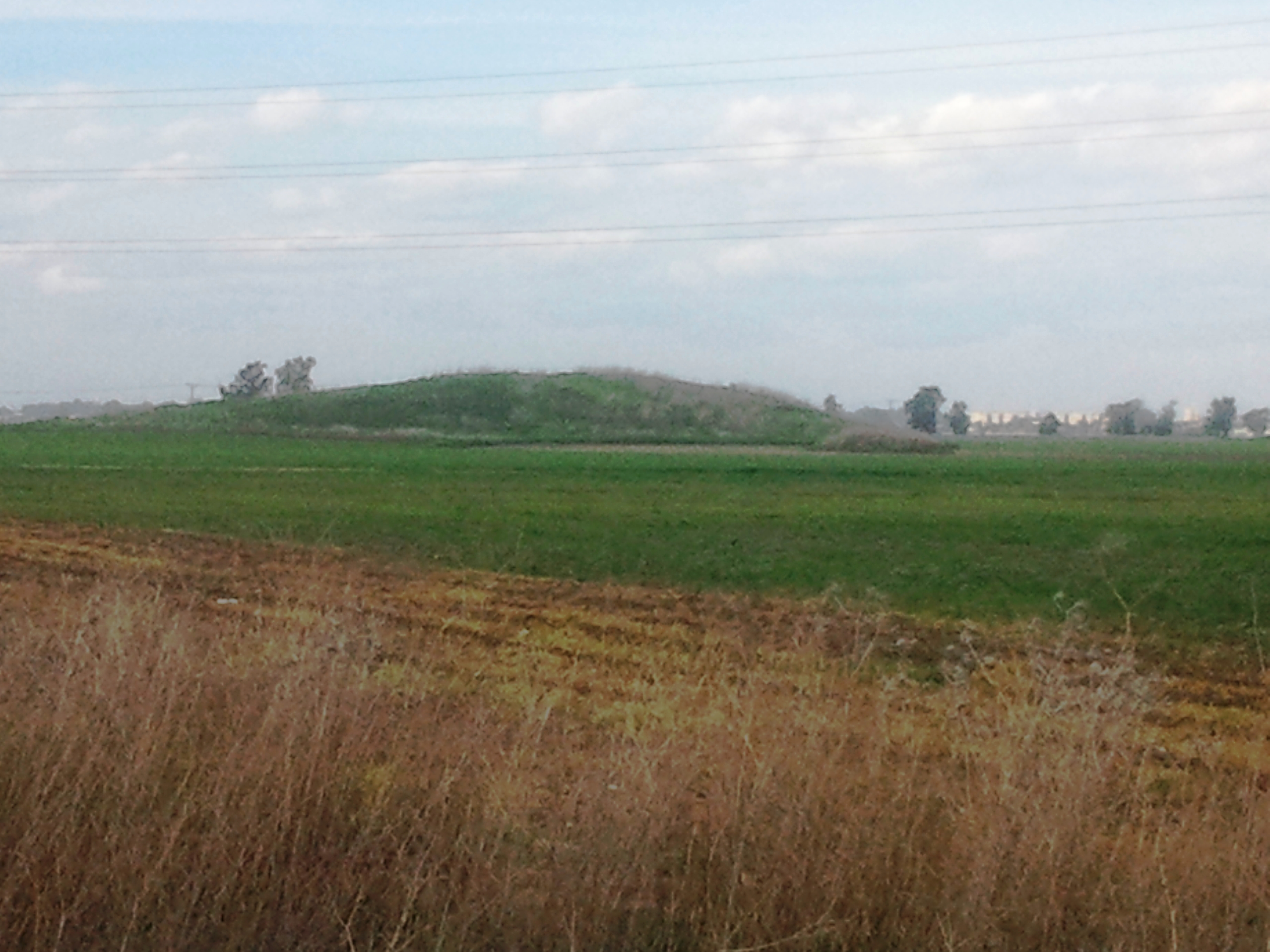 תֵּל פָּר ידוע גם בשם תֵּל אֶל-פָאר הוא [אתר ארכאולוגי בעמק זבולו השוכן בסמוך לצומת זבולון מצפון לכביש 70 וממזרח לכביש 780 המוביל לקרית אתא.